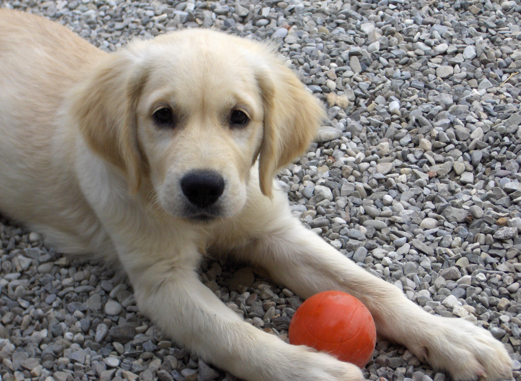 Immagine di un cucciolo di cane (razza Golden Retriever)